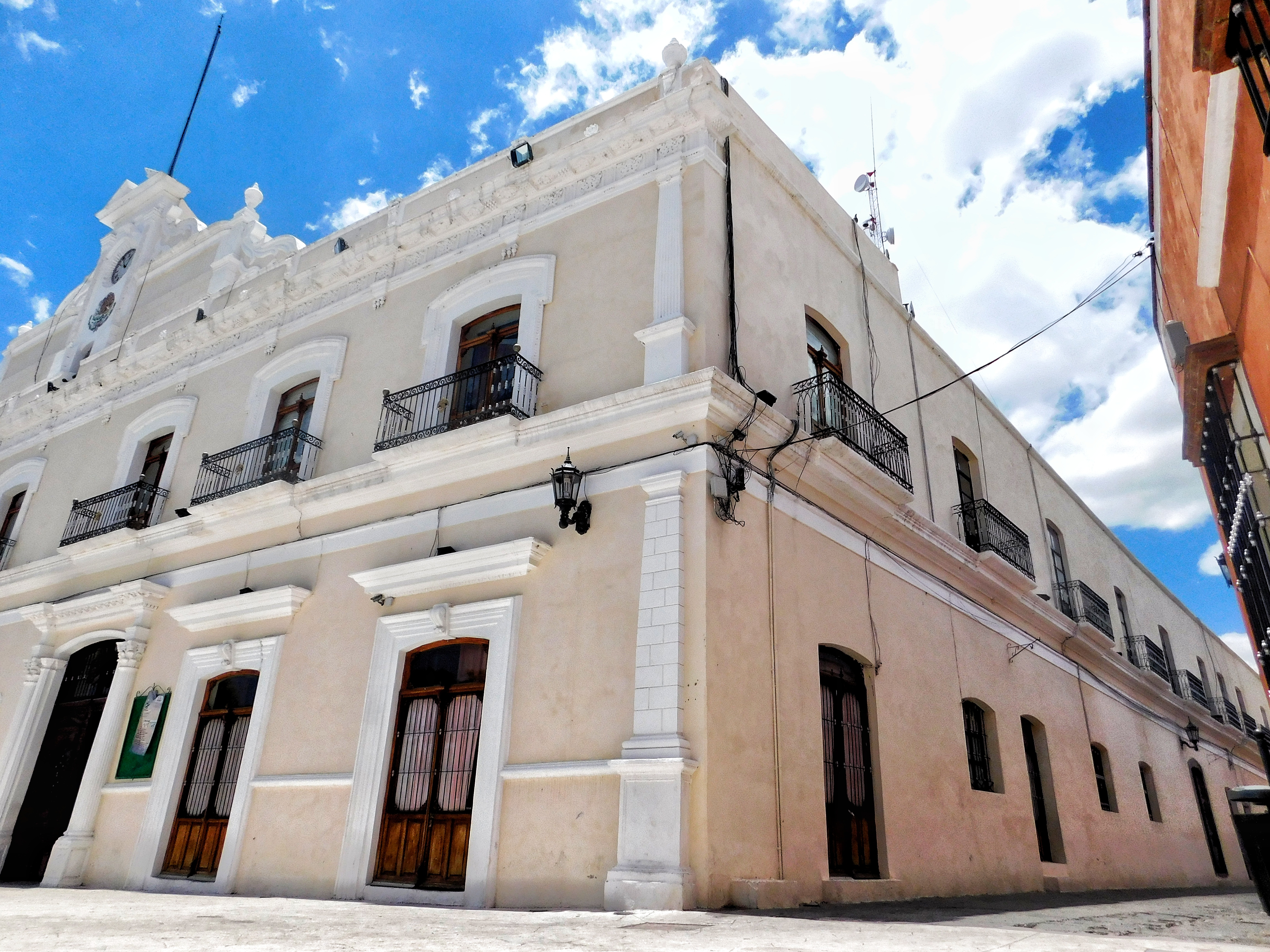 Palacio municipal de Huamantla.